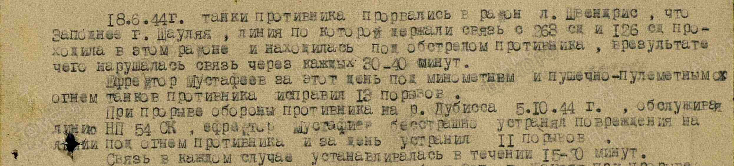 данные в учетной картотеке